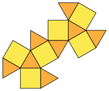 развертка кубооктаэдра